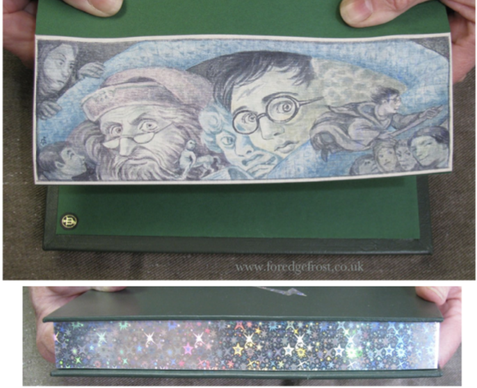 Skjult snittmaleri på Harry Potter-boken "De vises sten". Kunstner: Martin Frost, England